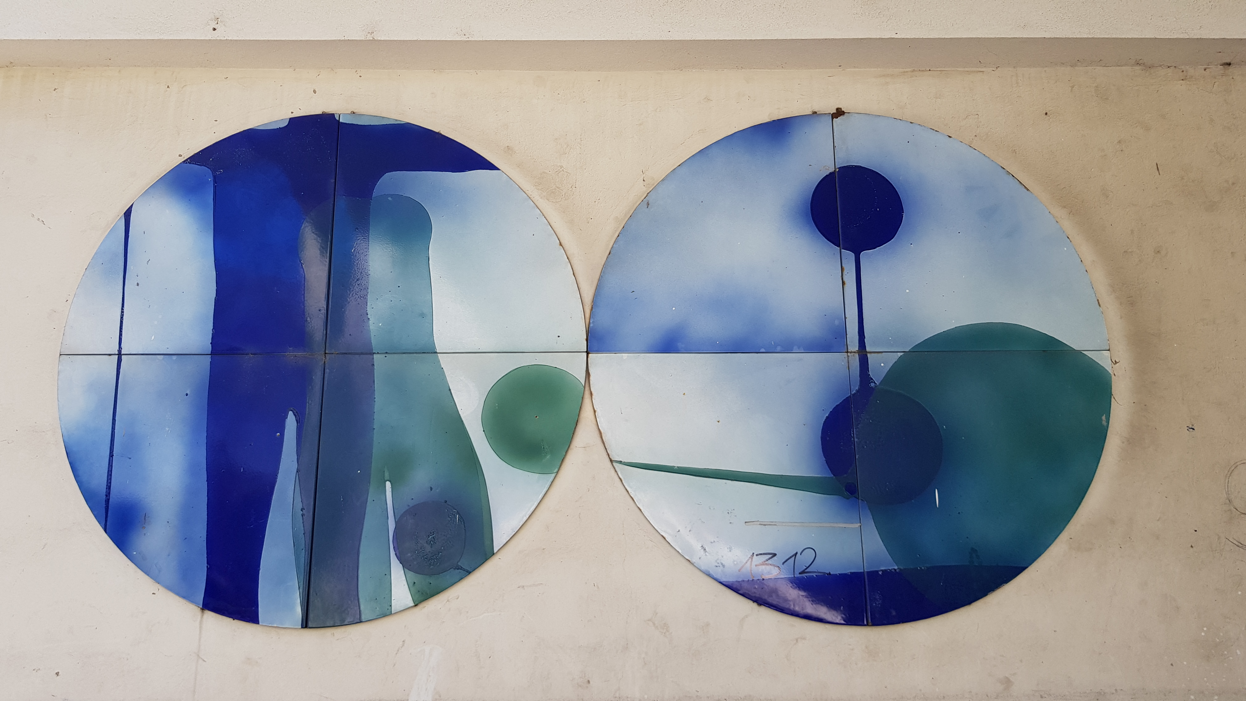 Keramikfassadenplatten an einem der Wohngebäude am Schöpfwerk. Diese Paneele sind in der gesamten Wohnsiedlung in verschiedenen Formen und Farben sichtbar.